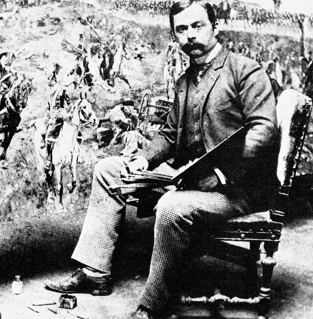 Wojciech Kossak w pracowni